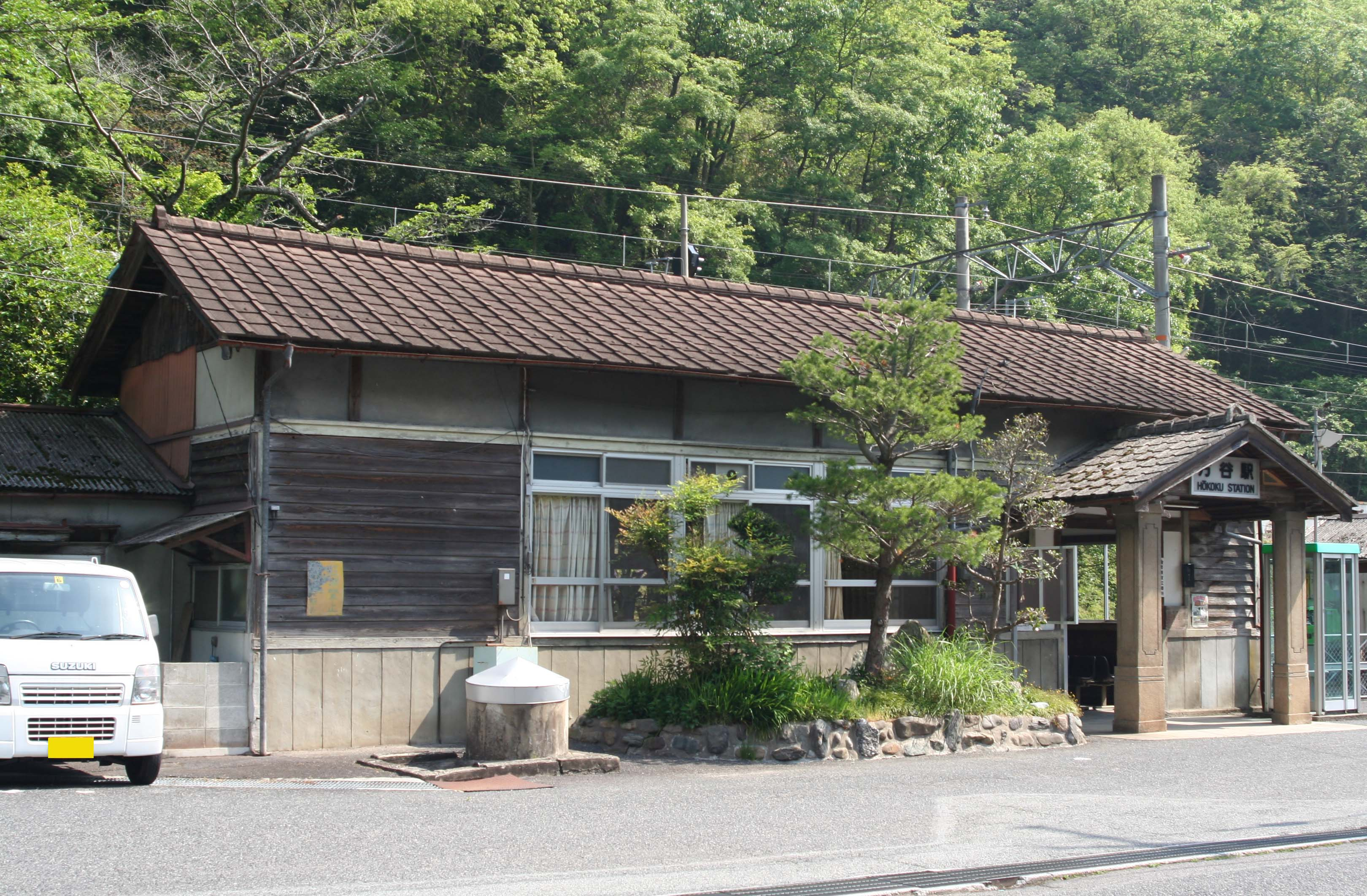 方谷駅の駅舎